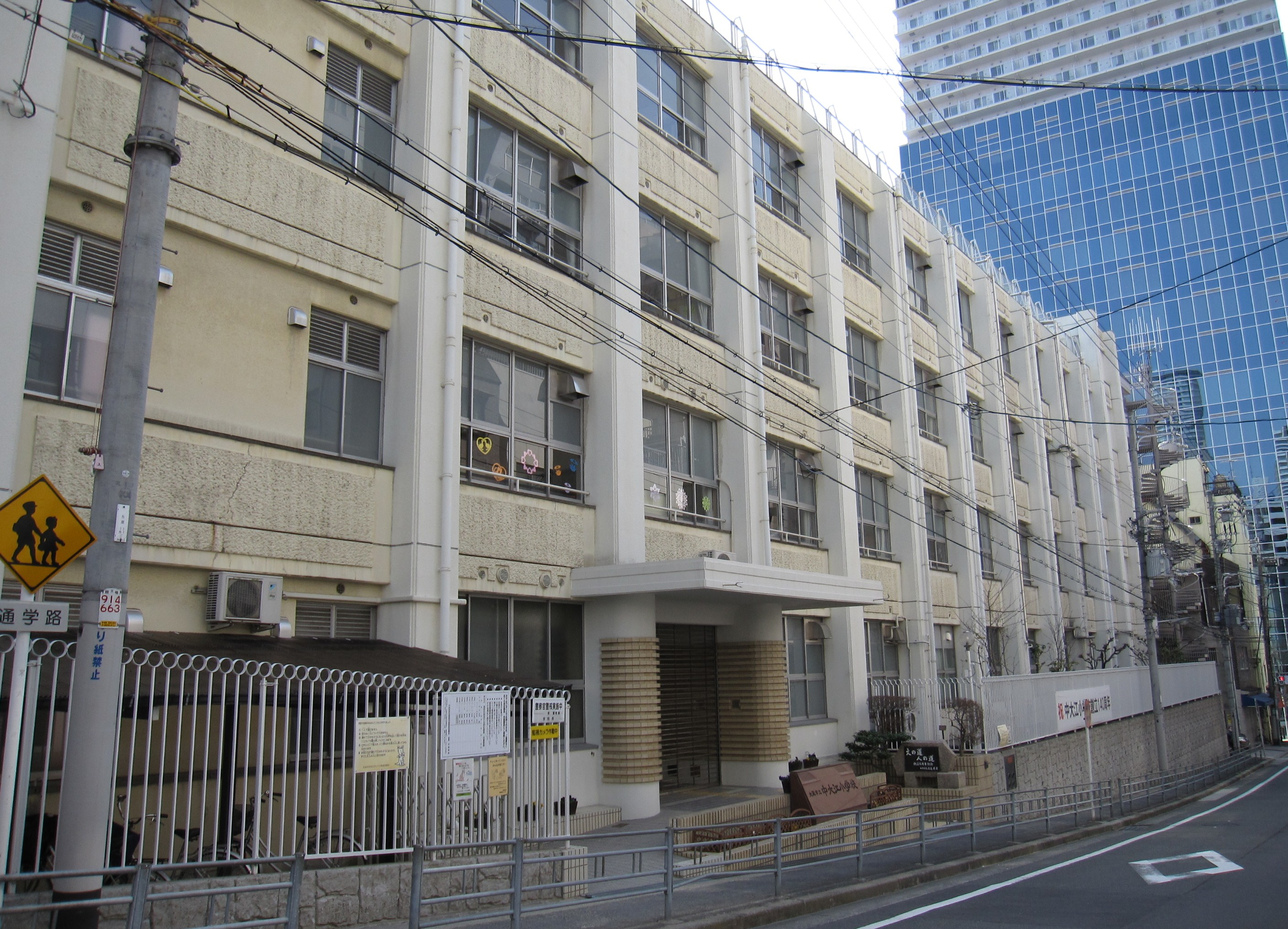 大阪市立中大江小学校